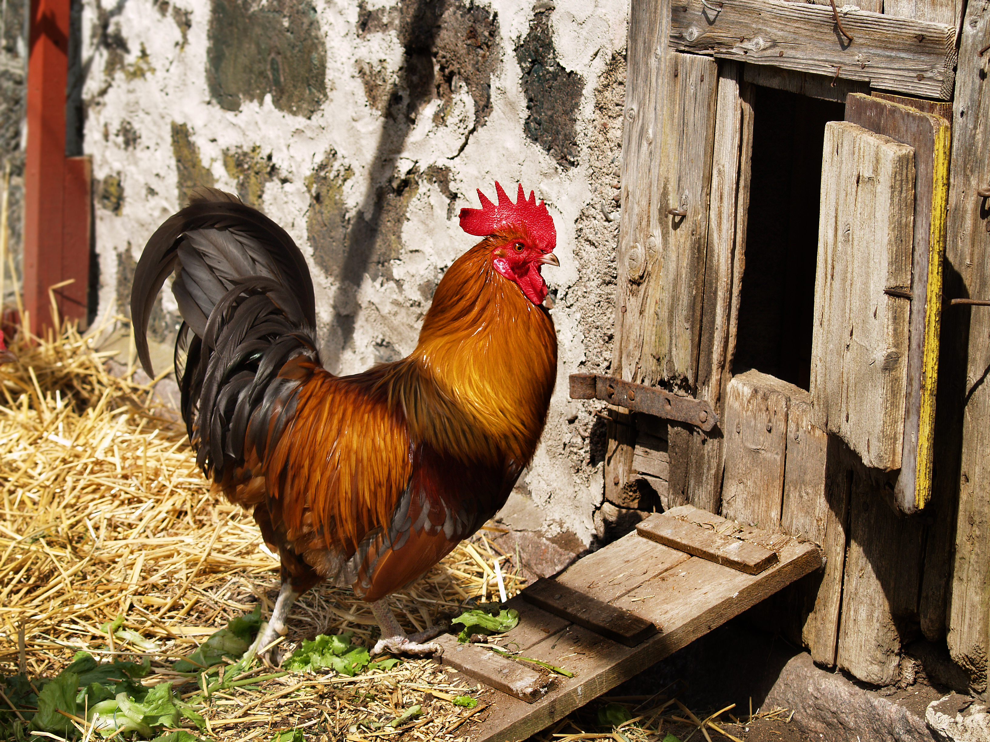 Rooster in Finland